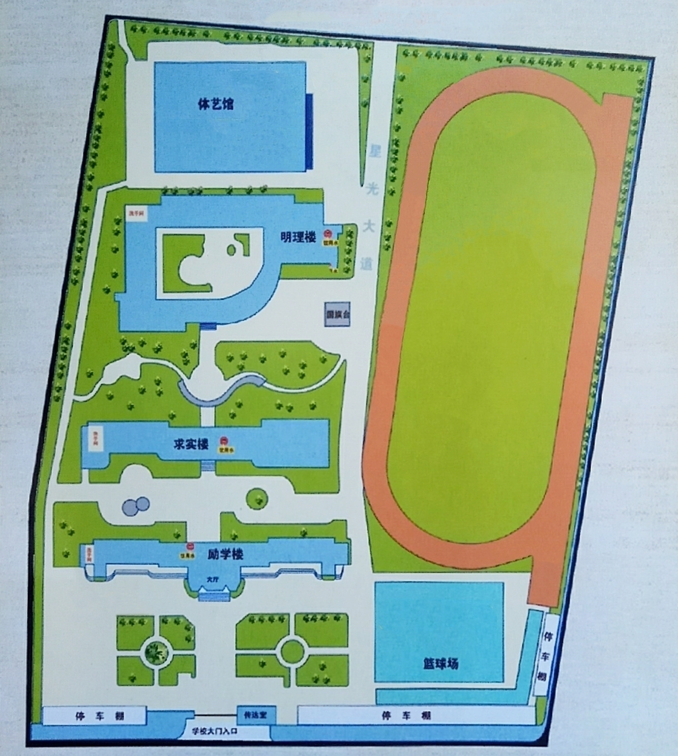 中文（中国大陆）: 玉环市城关一中校园导览图